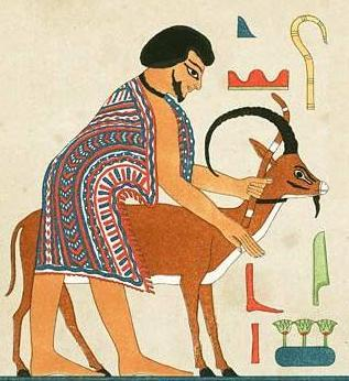 Hyksos Abiša; malba v Chnumhotepově hrobce v Bení Hasanu, doba Senusreta II.